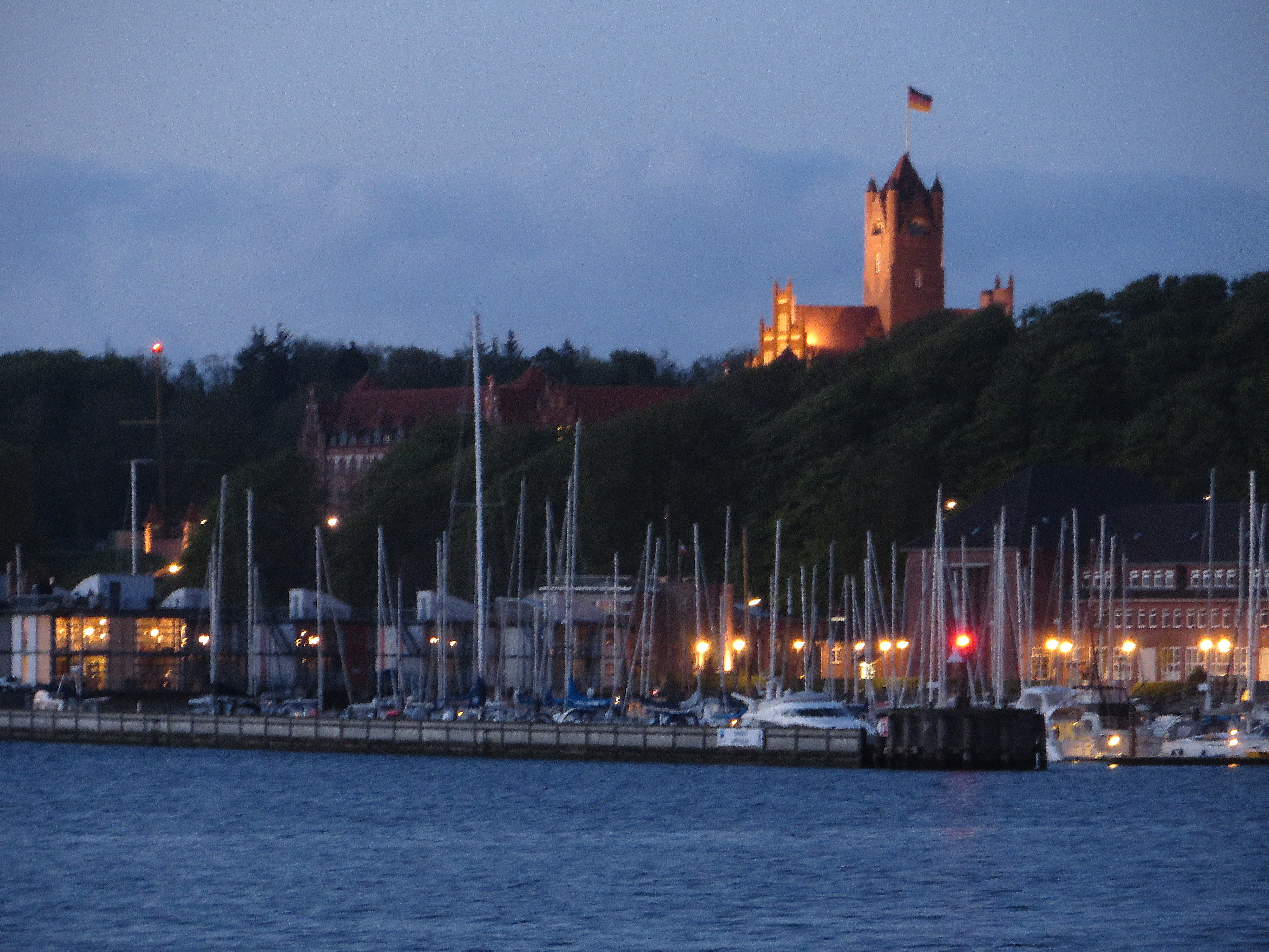 Rote Schloss zur Nacht über Sonwik (Flensburg-Mürwik 7 Mai 2015)